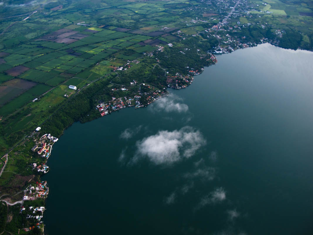 Vuelo a 7 mil 600 pies de altura sobre el nivel medio del mar